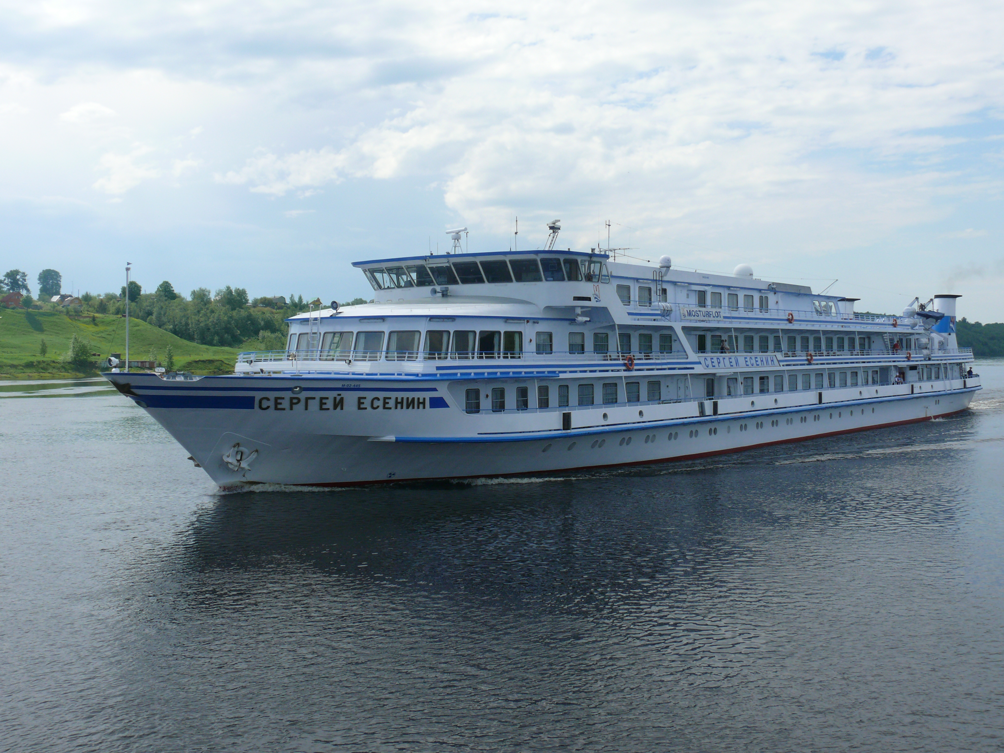 Речной туристический теплоход "Сергей Есенин".